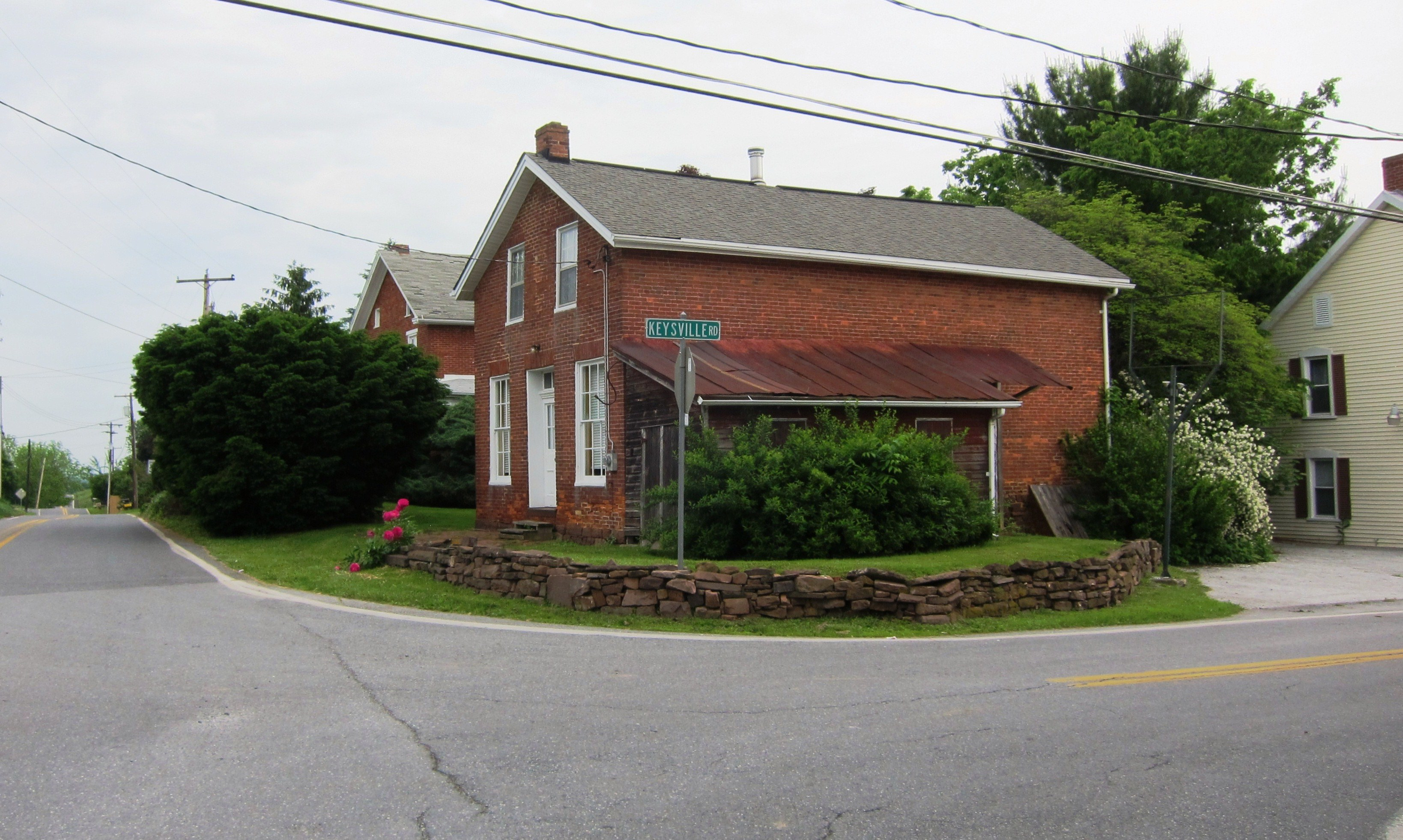 Corner Keysville - Bruceville Roads